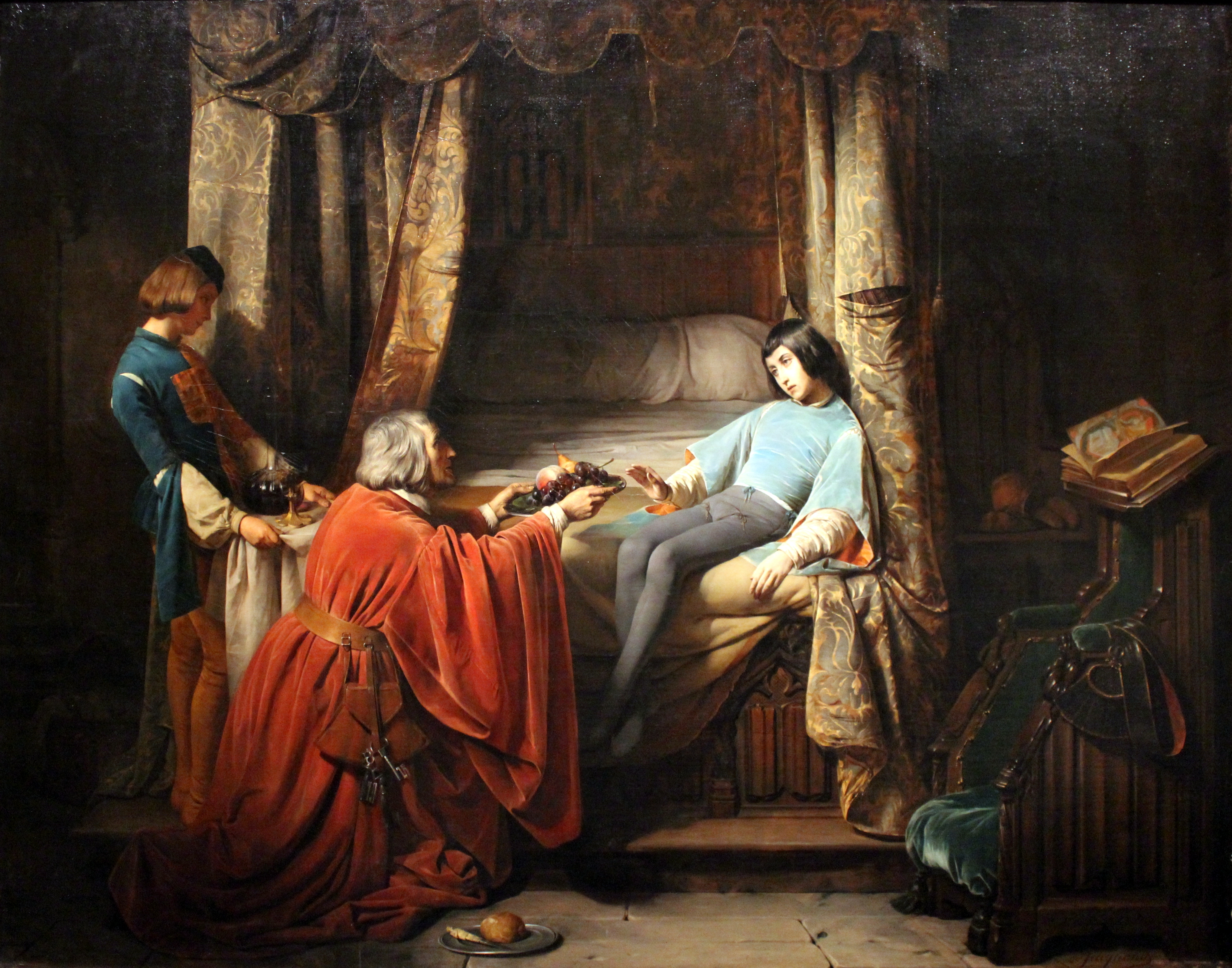 Le Jeune Gaston, dit l'ange de Foix, peint par Claudius Jacquand en 1838, exposé au Musée des beaux-arts de Lyon en 2014.